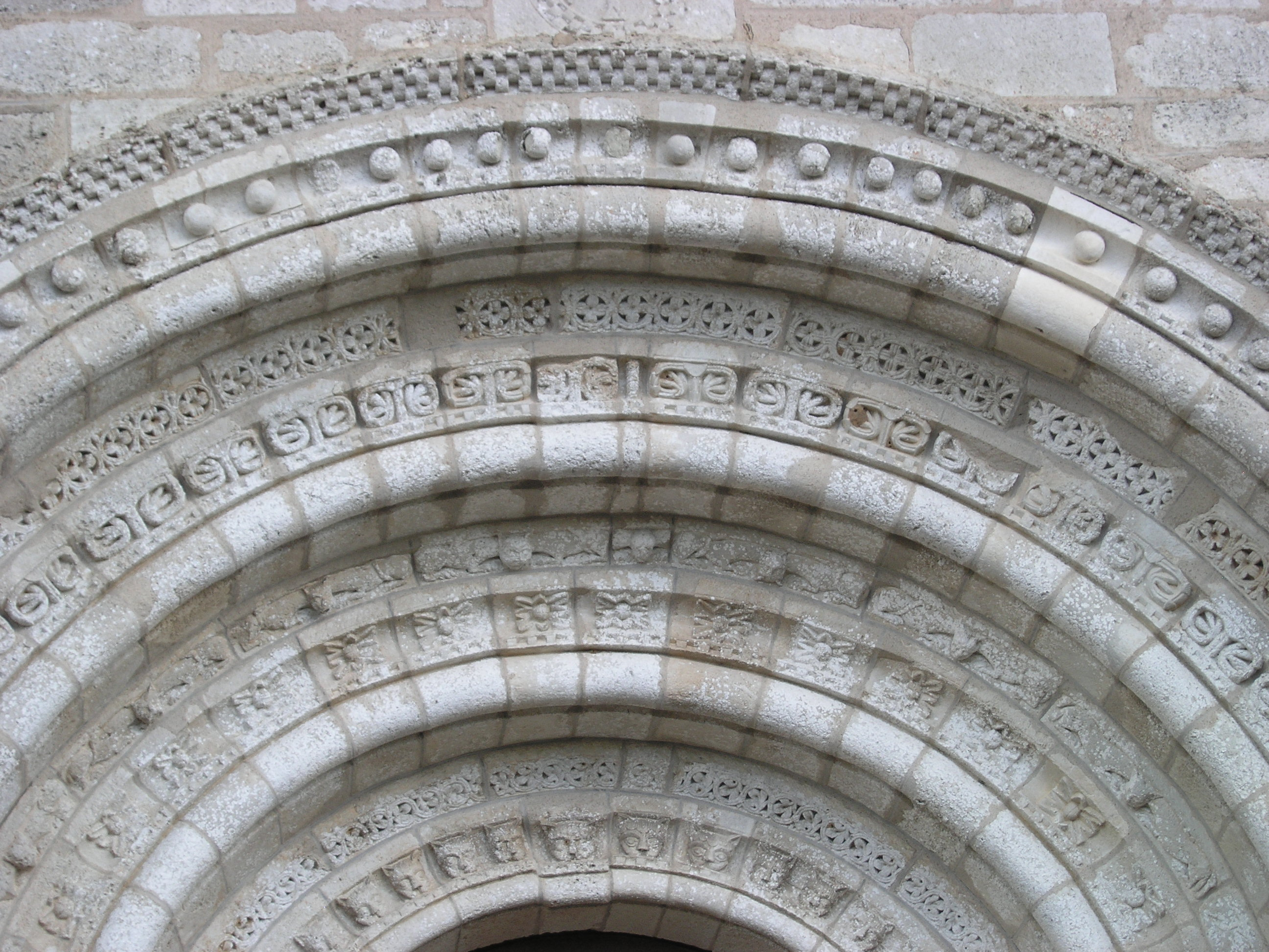 Kirche Saint-Michel in Lescure-d'Albigeois, Portal-Bögen